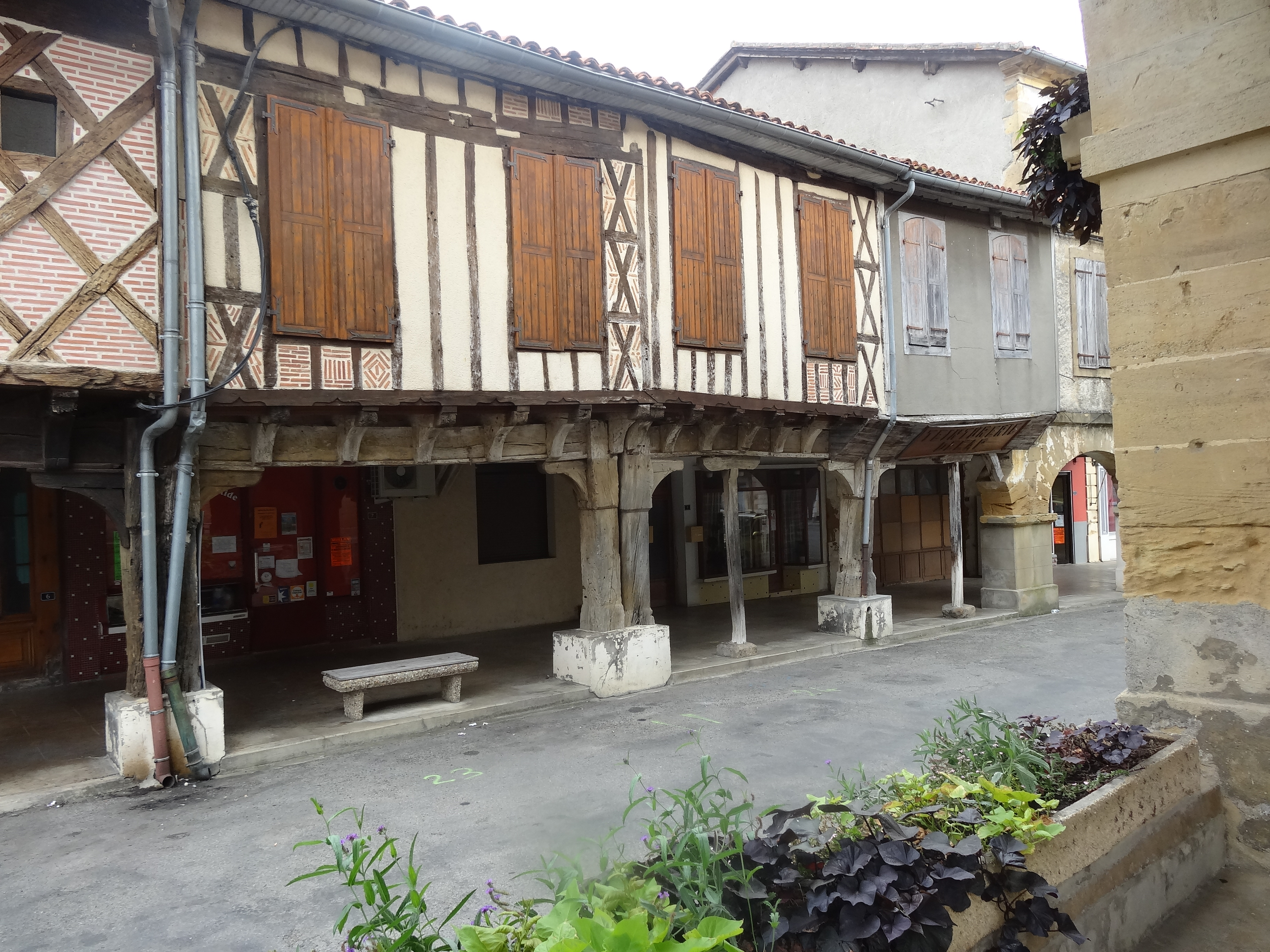 Maison à pans de bois de Miélan.